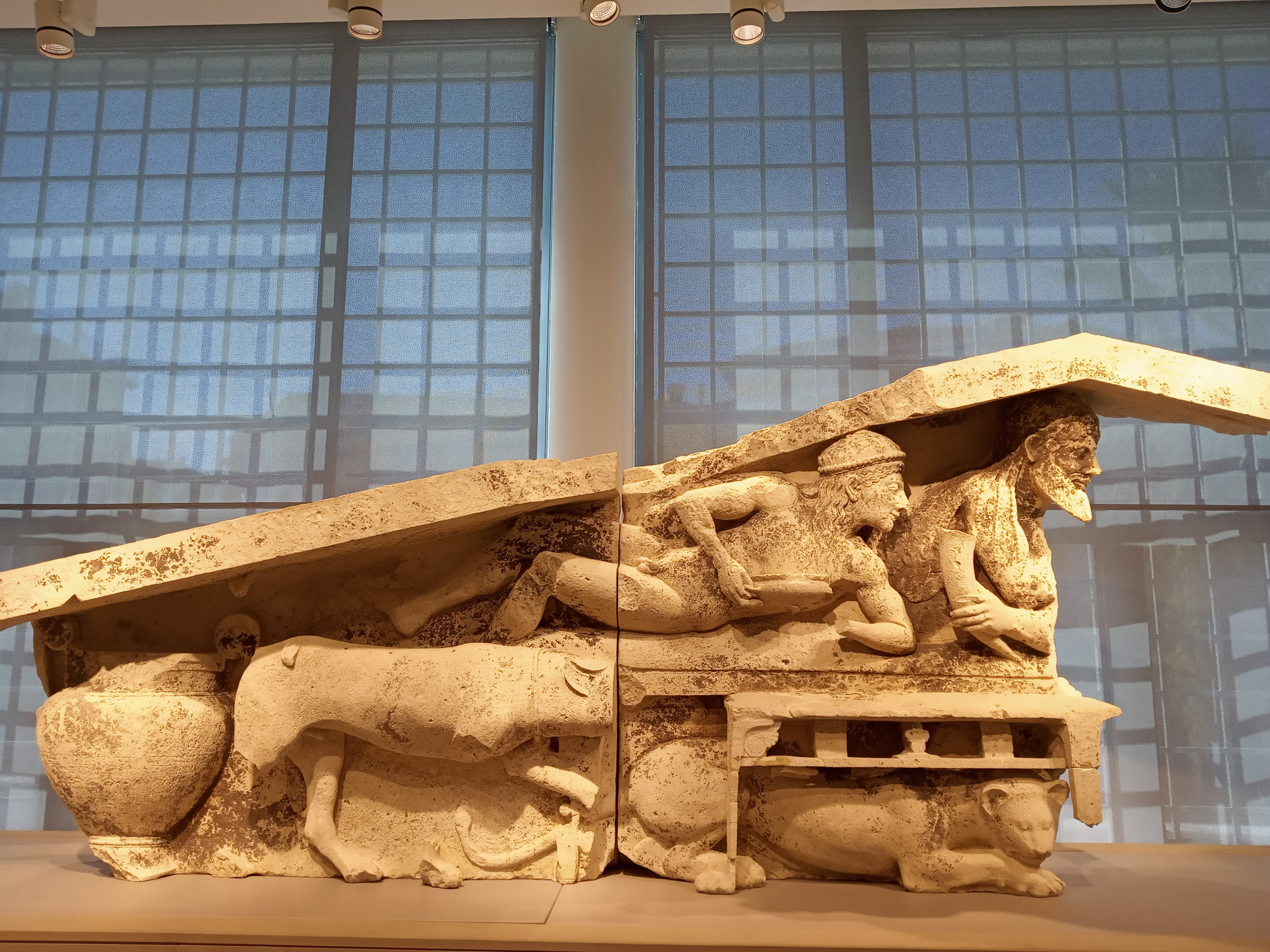 Археологічний музей Керкіри, греція, острів Керкіра